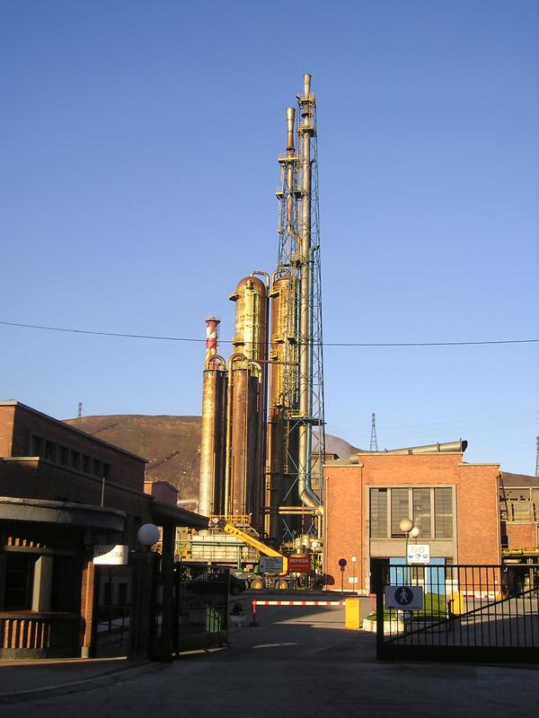 Sefanitroko lantegia